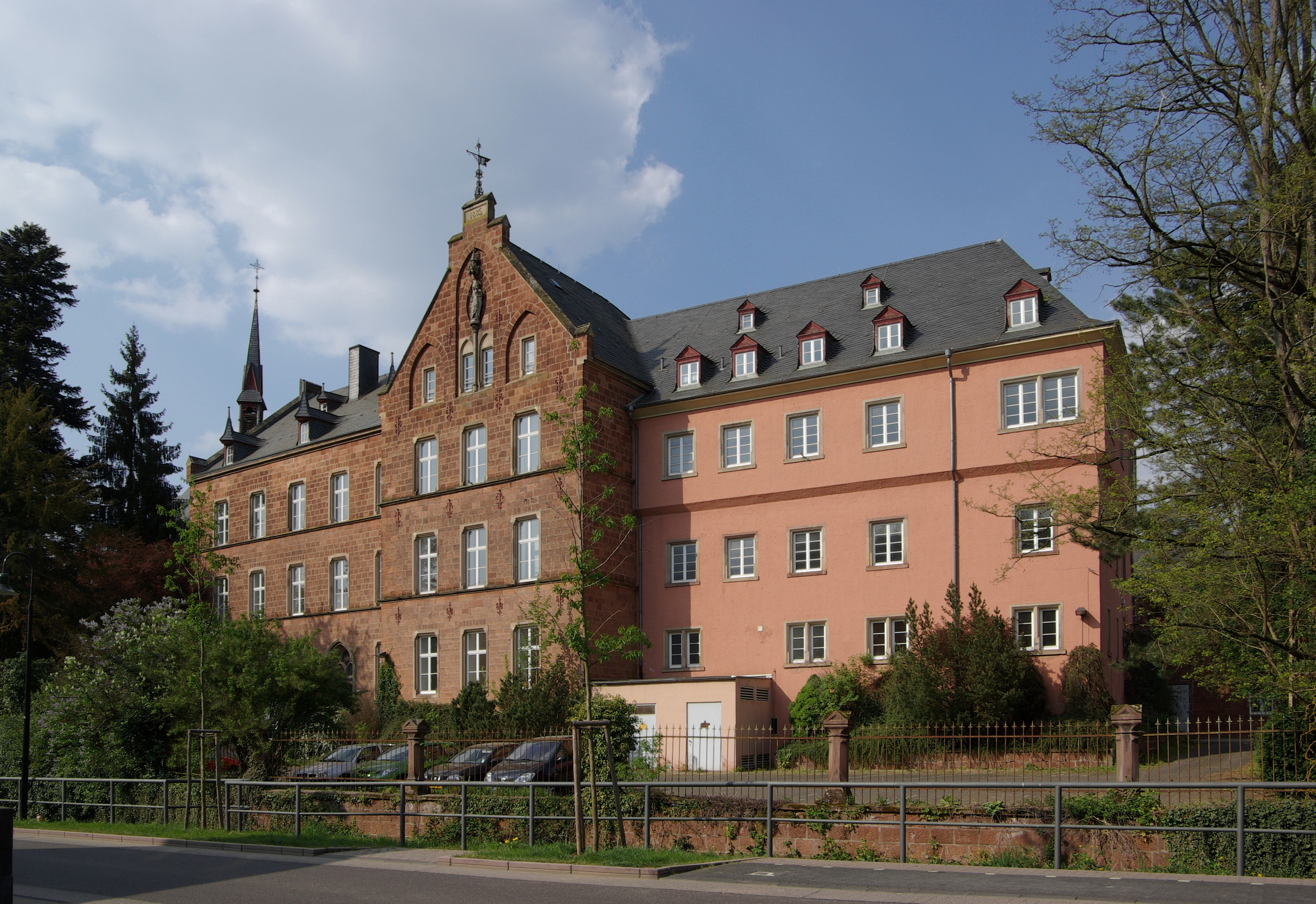 Trier, Olewiger Straße 189: ehemaliges Frauenkloster Xaveriusstift; dreigeschossiger Rotsandsteinbau mit wohl wenig jüngerem Neurenaissance-Anbau